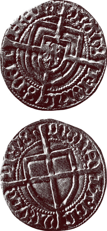 preußischer Groschen des 14. Jh.